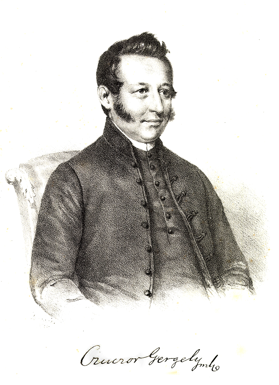 Czuczor Gergely (Andód, 1800. december 17. – Pest, Belváros, 1866. szeptember 9.)[1] magyar bencés szerzetes, költő, nyelvtudós, a Magyar Tudományos Akadémia tagja. Eredeti neve Czuczor István, rendi neve lett a Gergely. Jedlik Ányos fizikus unokatestvére.